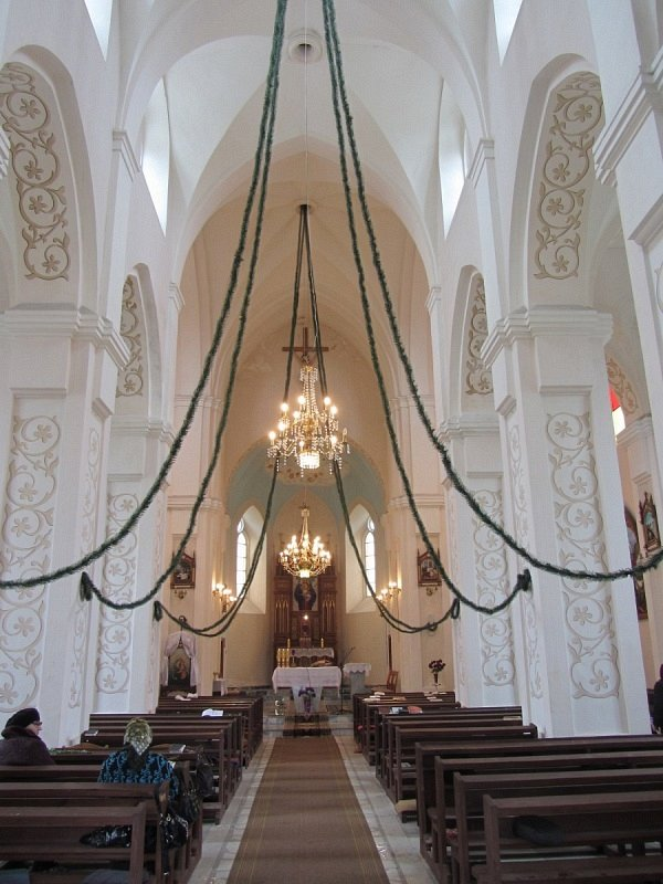 Пескі (Мастоўскі раён). Касцёл Маці Божай Ружанцовай